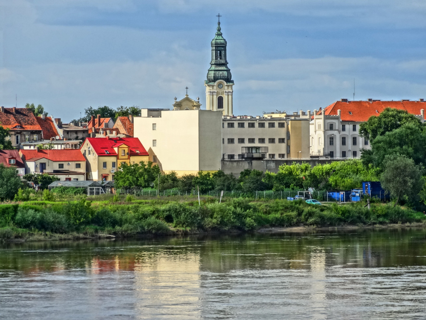 Widok Starego Fordonu (dzielnicy Bydgoszczy) od strony Wisły, widoczny m.in. kościół św. Mikołaja